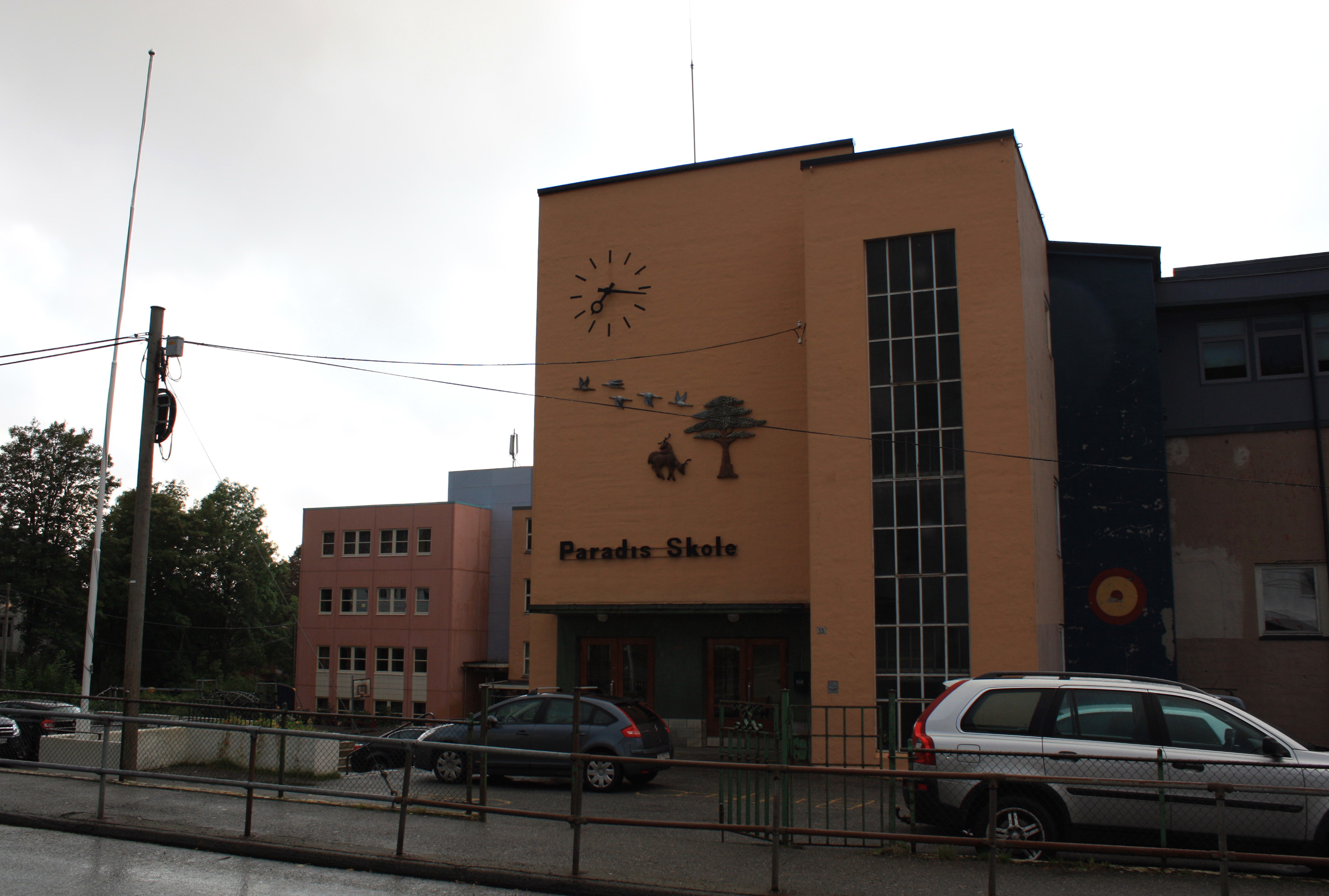 Paradis Skole, Fana, Bergen.